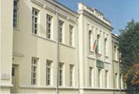 ІОУ "Отец Паисий" - град Русе